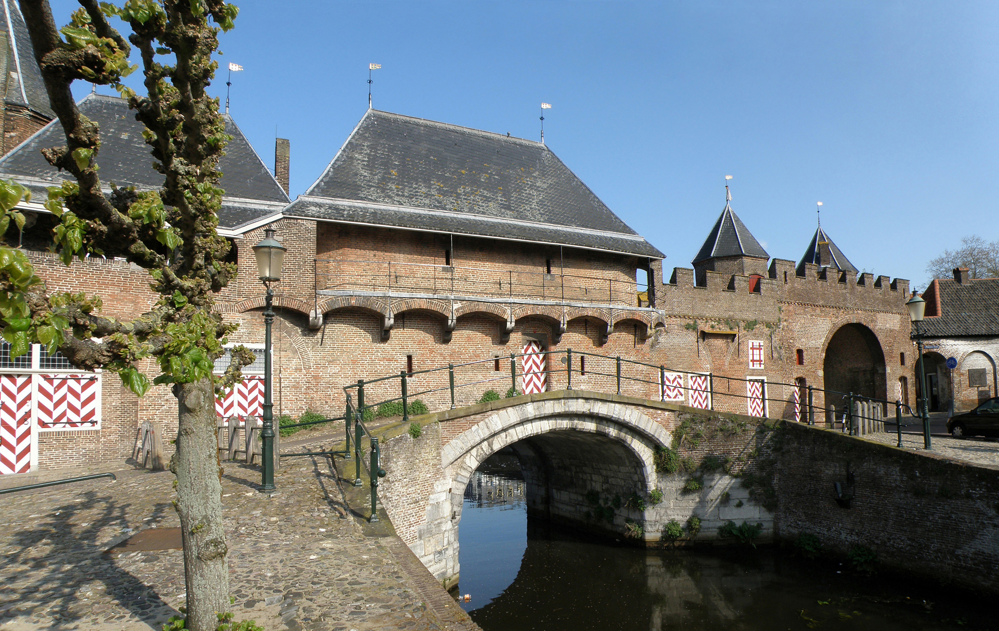 Amersfoort (prov. Utrecht, Nederland). Koppelpoort, stadszijde.